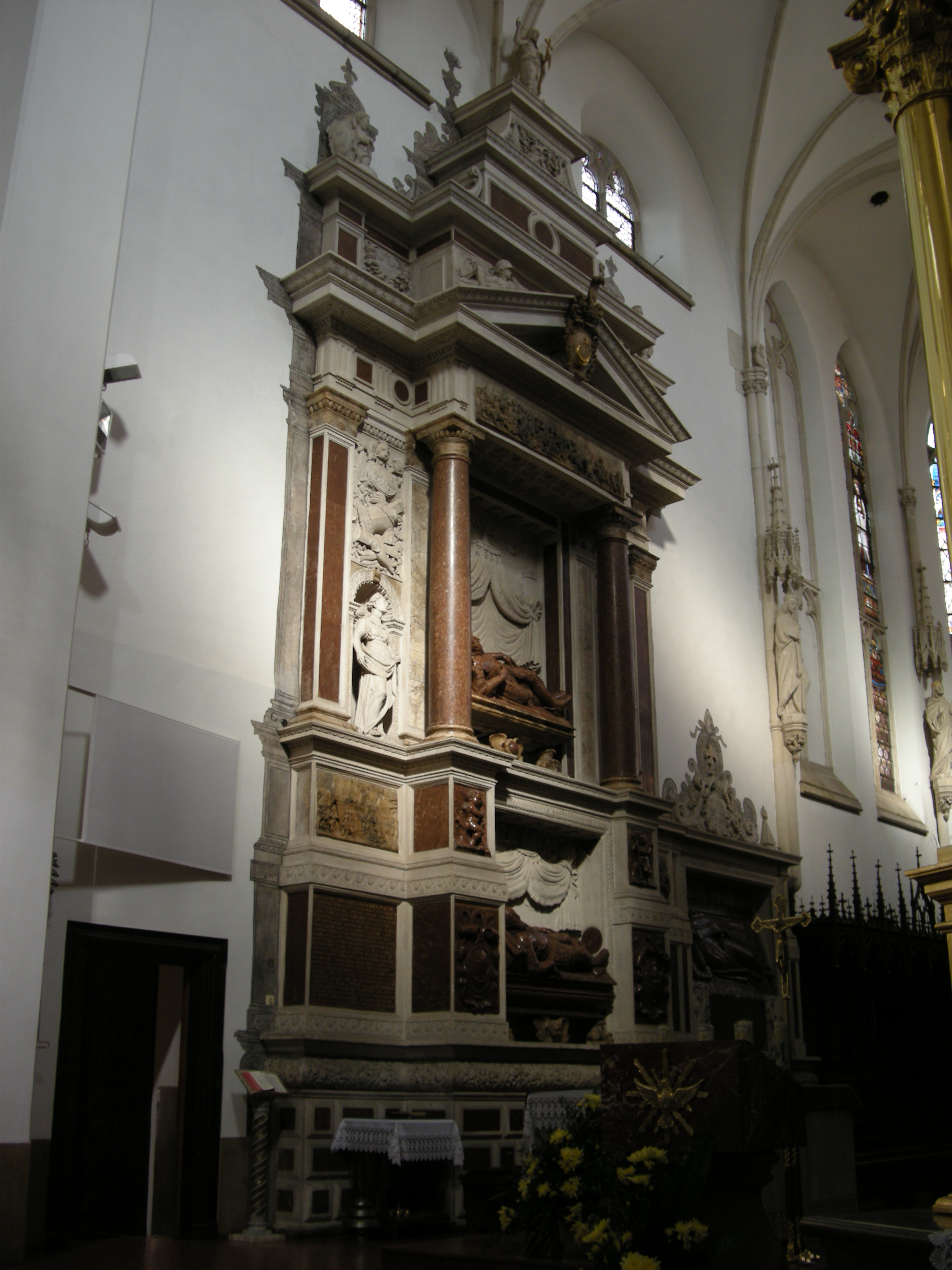 Pomnik Jana i Jana Krzysztof Tarnowskich w bazylice katedralnej w Tarnowie